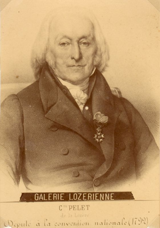 Portrait de Jean Pelet de la Lozère